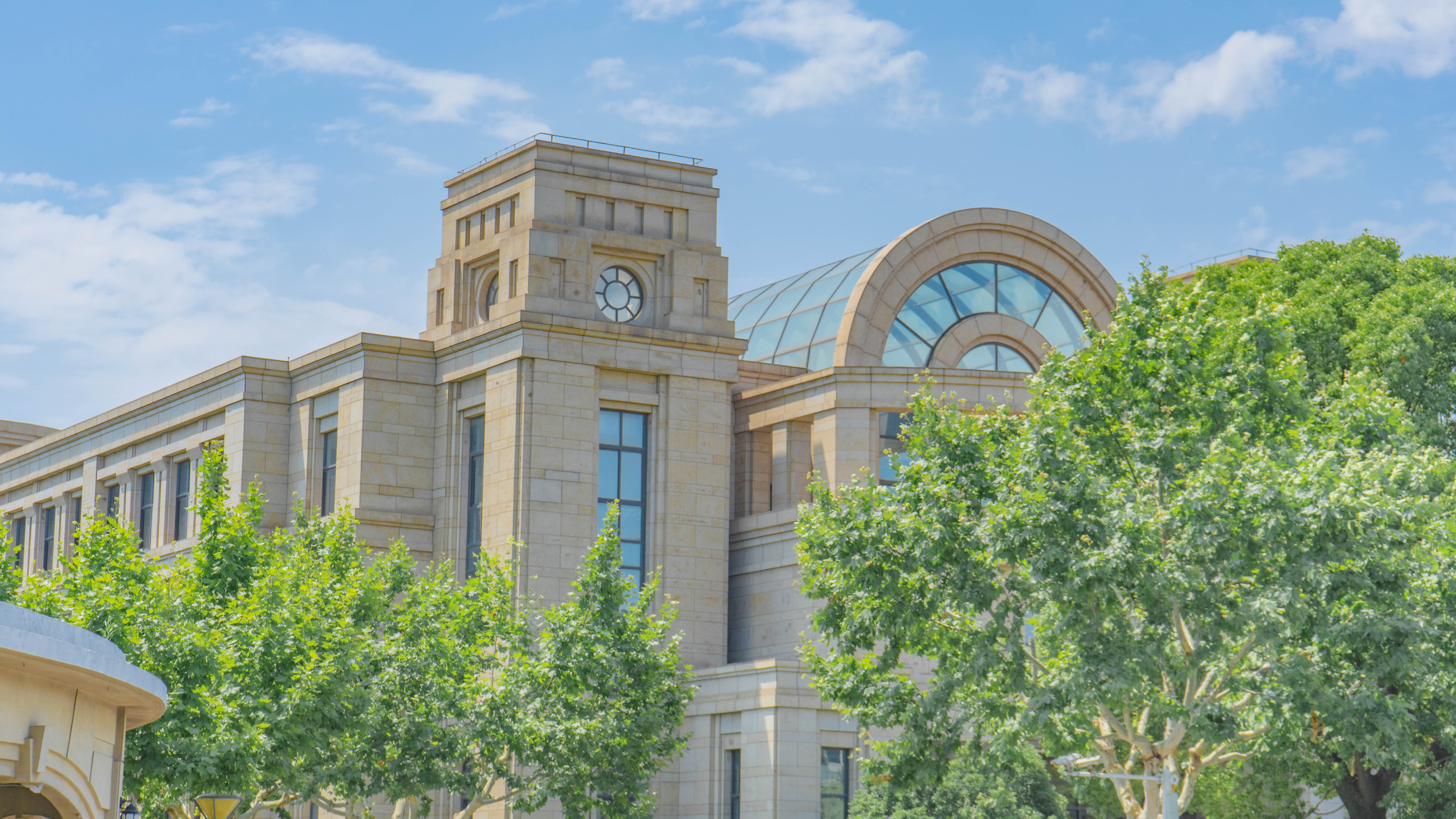 复旦大学江湾校区内拍摄的教学楼